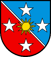 Das Wappen der Munizipalgemeinde Crans-Montana.